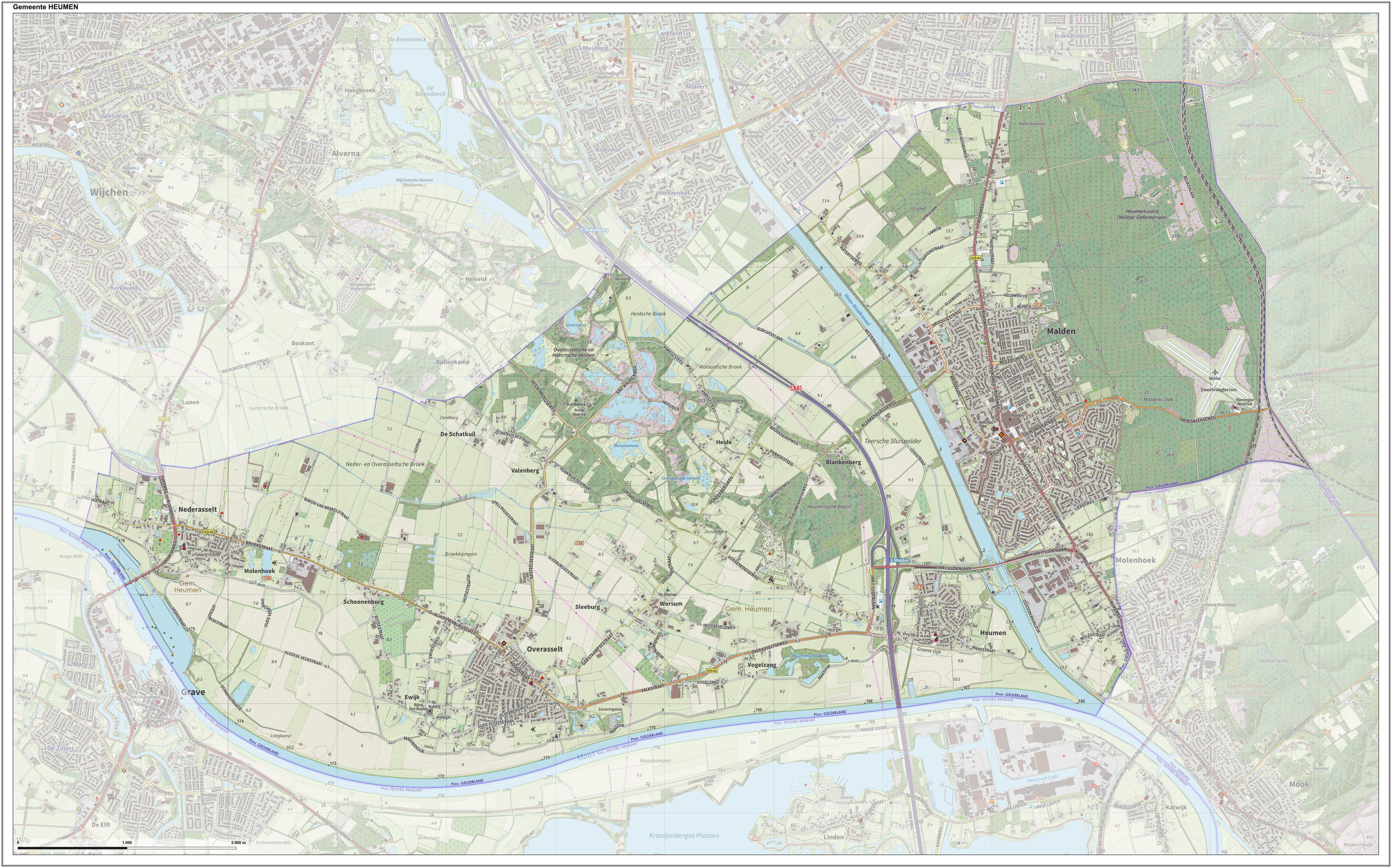 Topografische gemeentekaart. Resolutie: 400 pixels/km. Kaartbeeld samengesteld uit de open geodata van de Top10NL en Top25namen (Kadaster), Creative Commons-BY licentie. Gebouwvlakken uit open geodata BAG extract. Wegen uit de OpenStreetMap, OpenStreetMap community. Reliëfschaduw uit de Actuele Hoogtekaart AHN2. Samenstelling en kleurenschema: Jan-Willem van Aalst, met QGIS. Zie ook de Legenda.